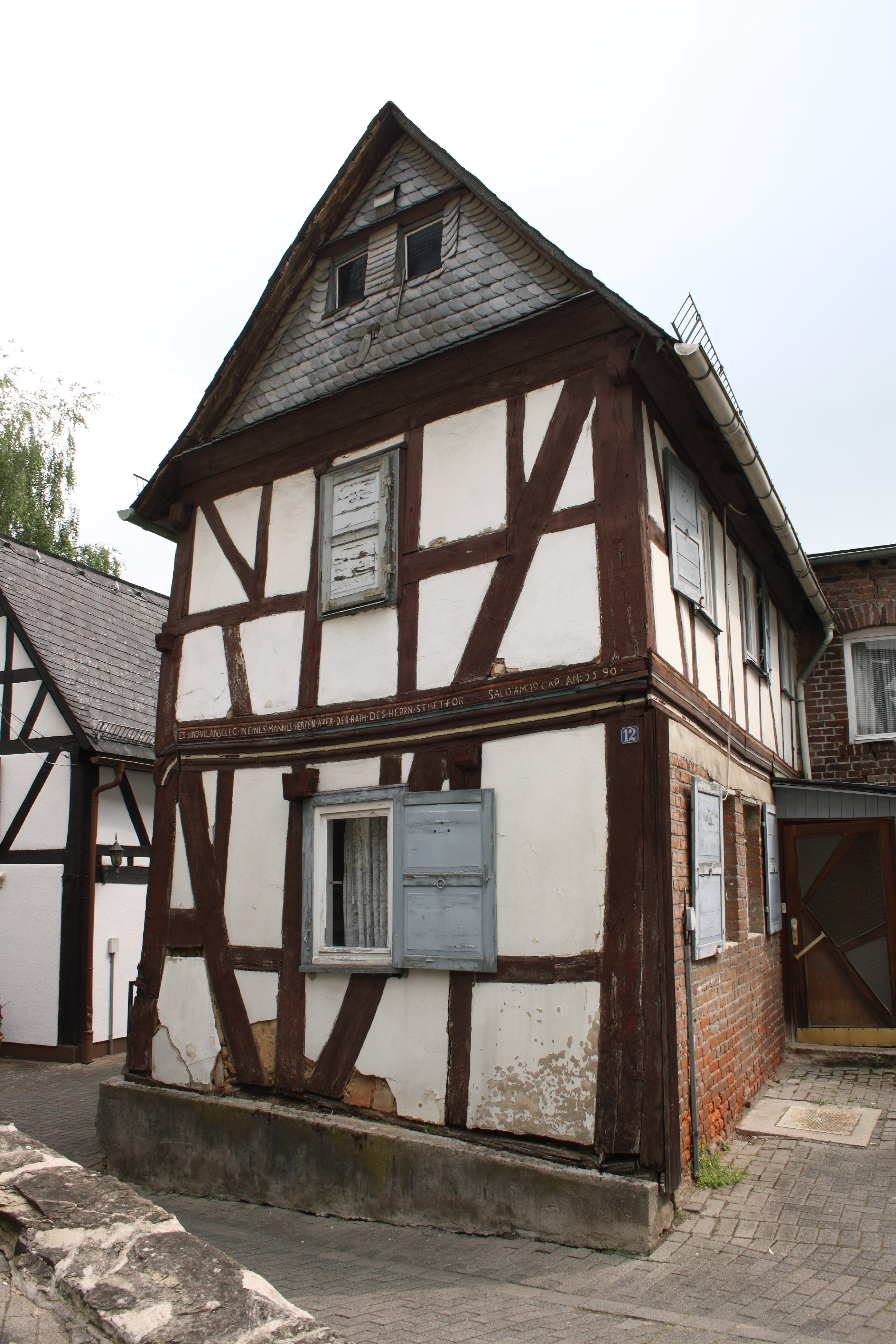 Haus Belzgasse 12 in Braunfels im Lahn-Dill-Kreis (Hessen)